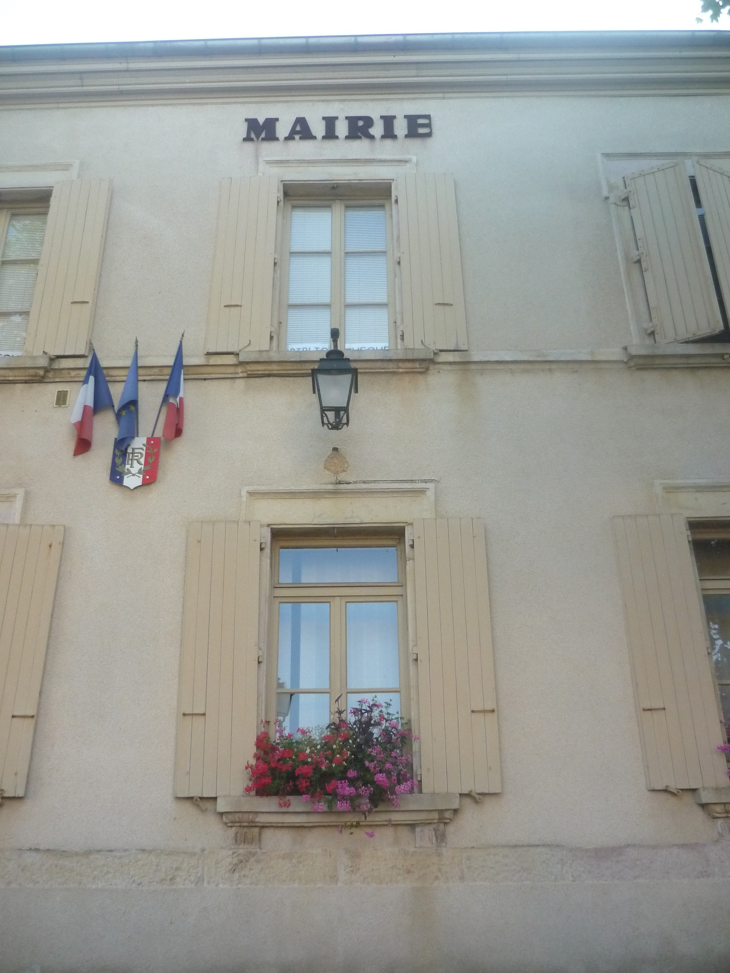 Mairie de Frontonas, dans l'Isère